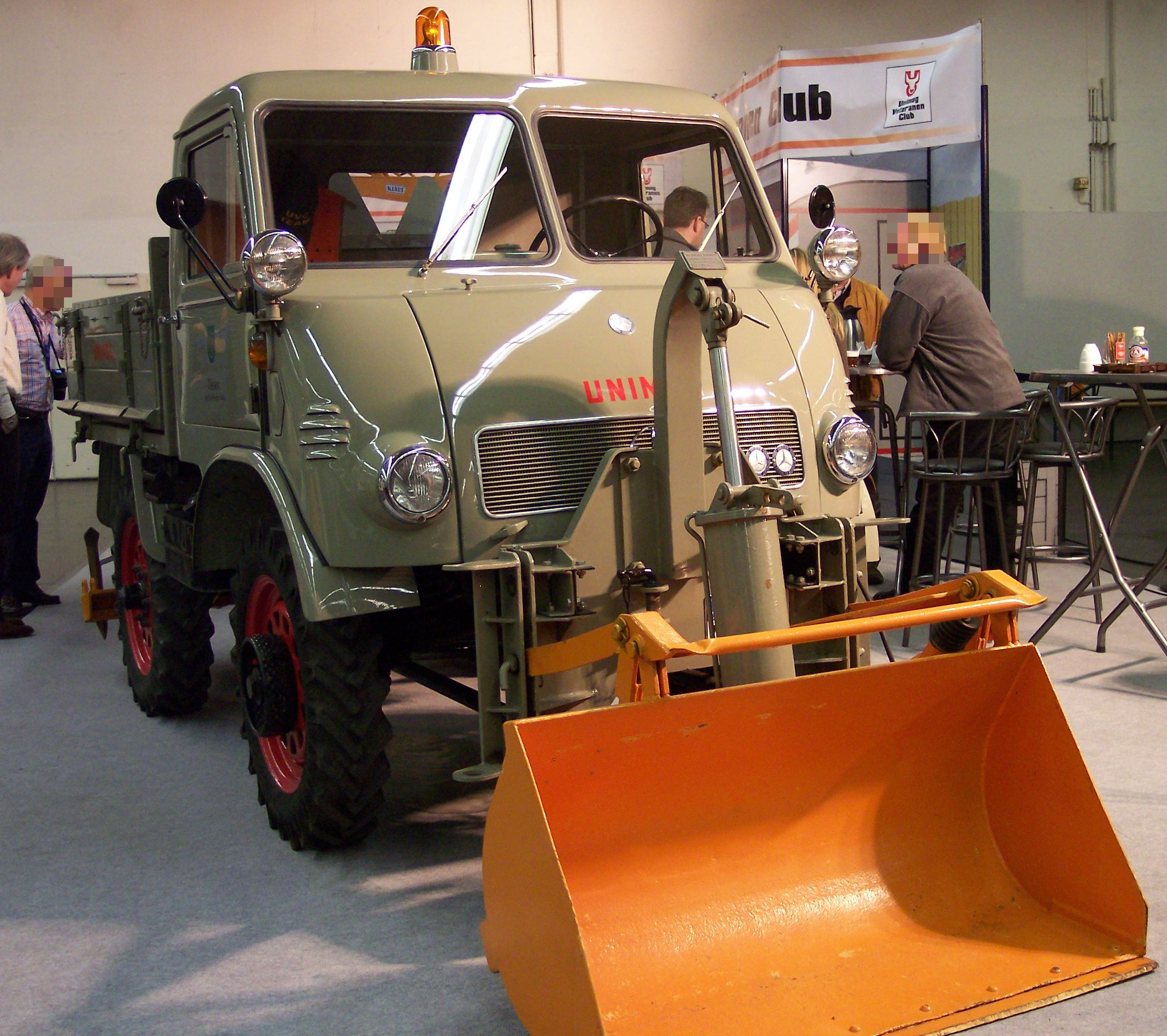 Mercedes Benz Unimog 401.